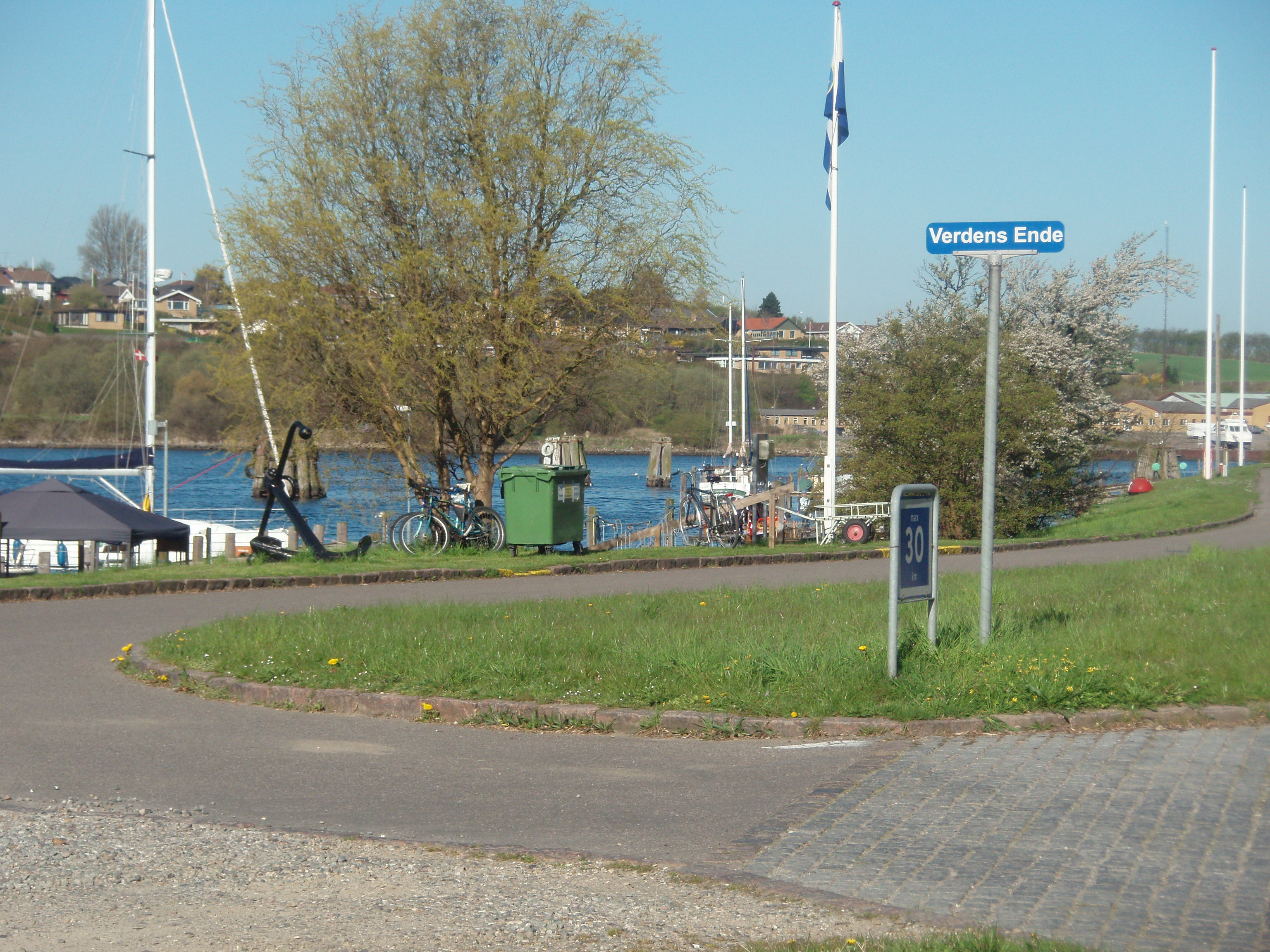 Verdens Ende, Sønderborg, Danmark